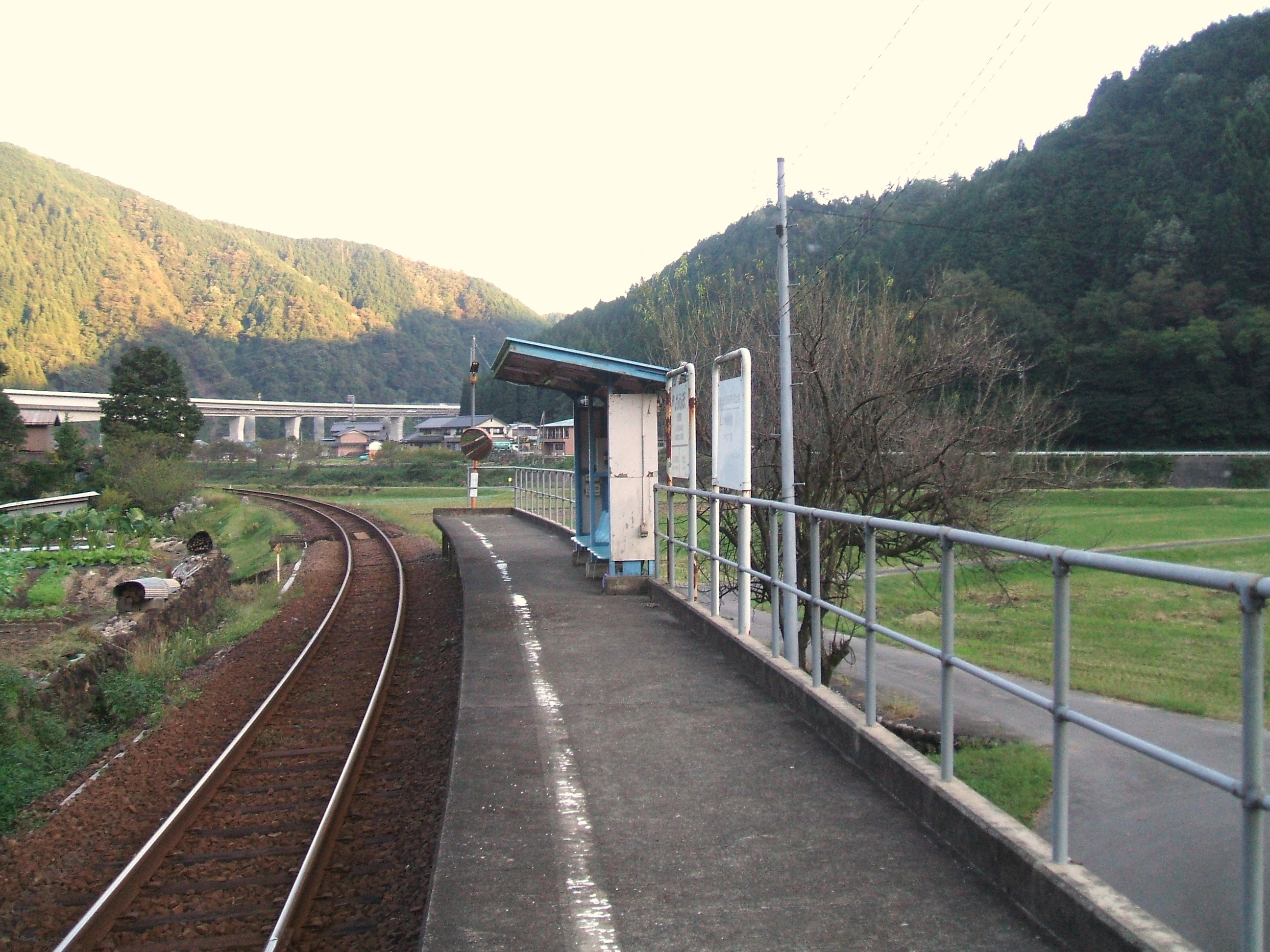 ホームの様子。